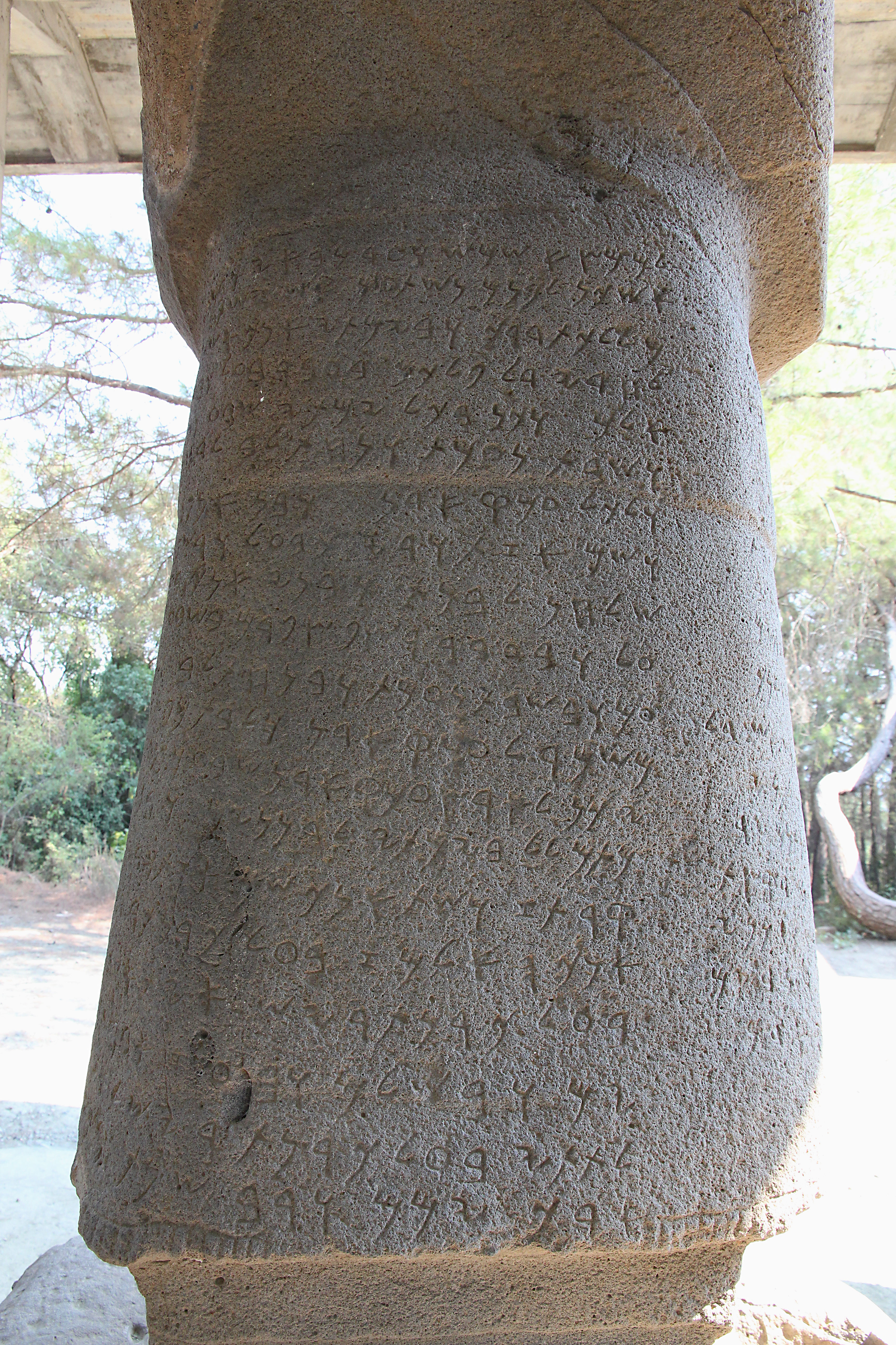 Karatepe (Asatiwataya), neo-hethitischer Fundort bei Osmaniye, Südtürkei, Phönizische Schrift auf Statue, Teil der Bilingue von Karatepe